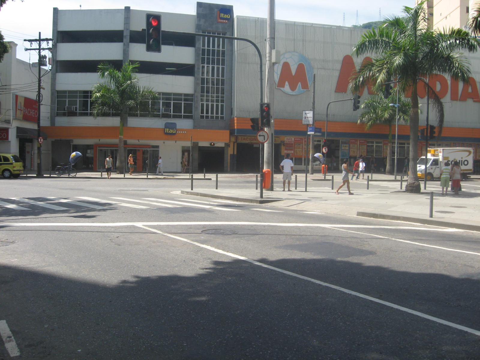 Vista do Largo da Segunda-Feira, localizado na Tijuca, bairro do Rio de Janeiro, Brasil.